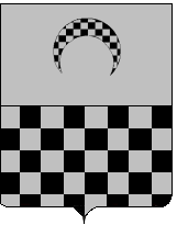 = Licenza d'uso ==